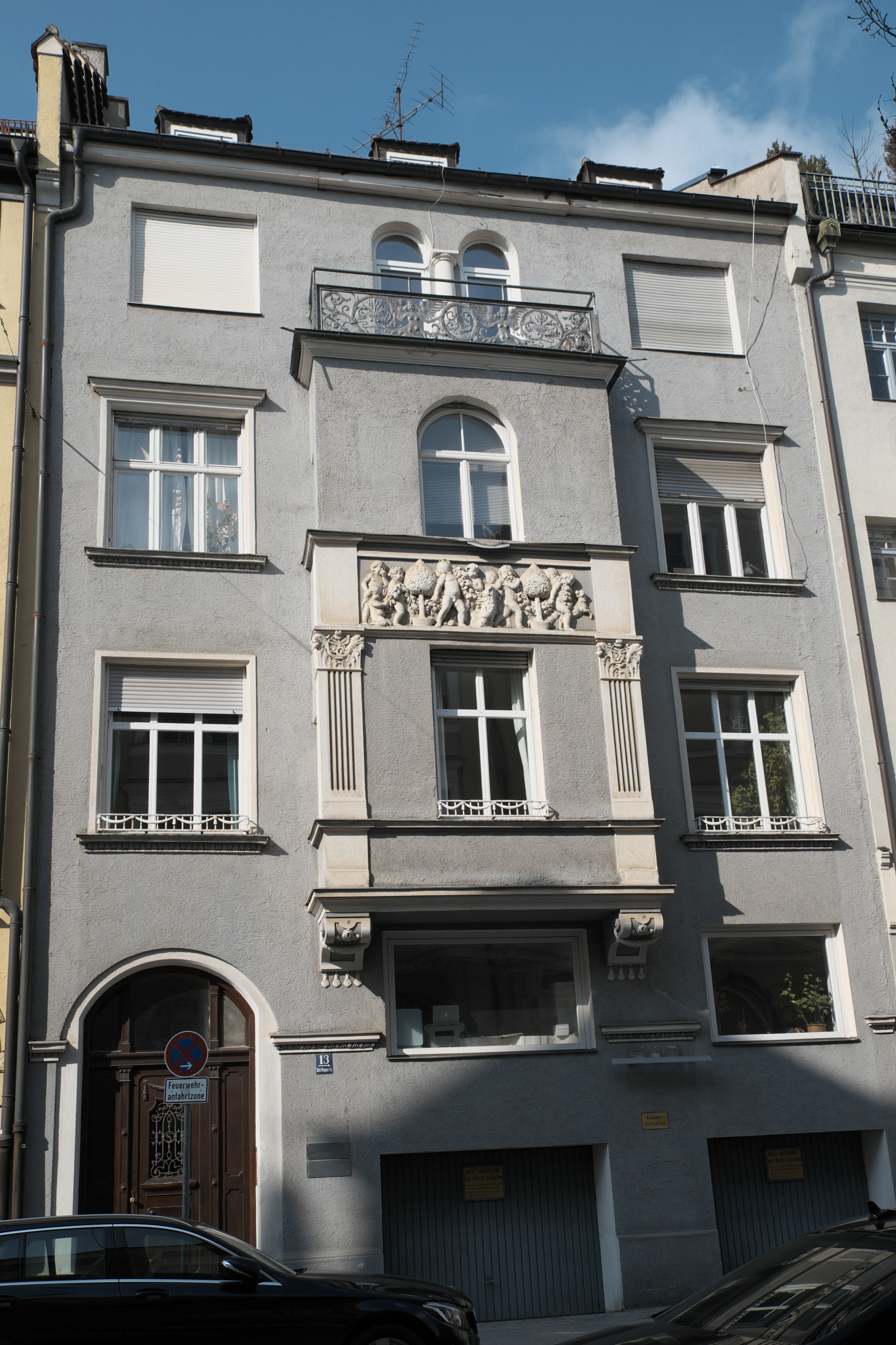 Wohnhaus in der Richard-Wagner-Straße 13 im Stadtbezirk Maxvorstadt in München (Bayern/Deutschland)